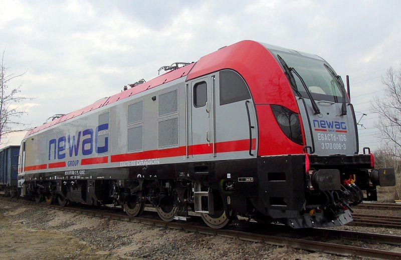 Lokomotywa elektryczna ze spalinowym silnikiem dojazdowym E6ACTd-106 z rodziny Newag Dragon należąca do Newagu podczas przekazania w użytkowanie przedsiębiorstwu Budokrusz na terenie stacji Warszawa Główna Towarowa.